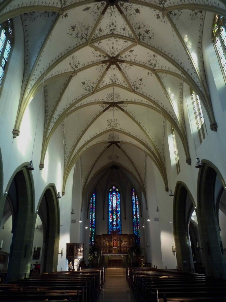 Die Kirche St. Christina in Herzebrock-Clarholz, Innenraum